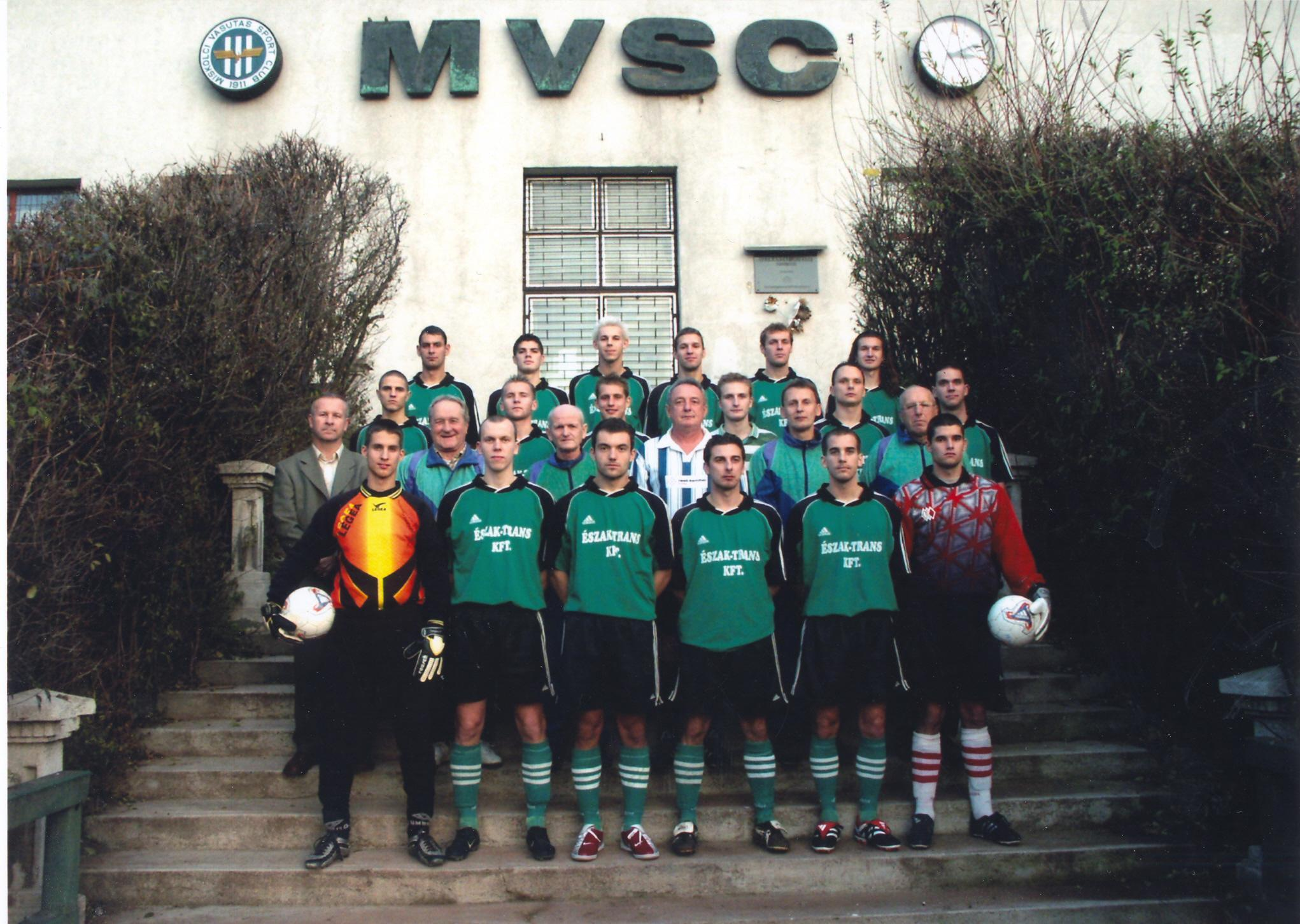 Miskolci VSC focicsapata